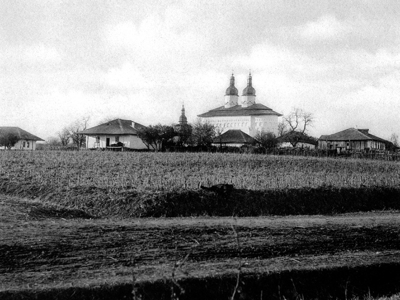 Războieni Monastery